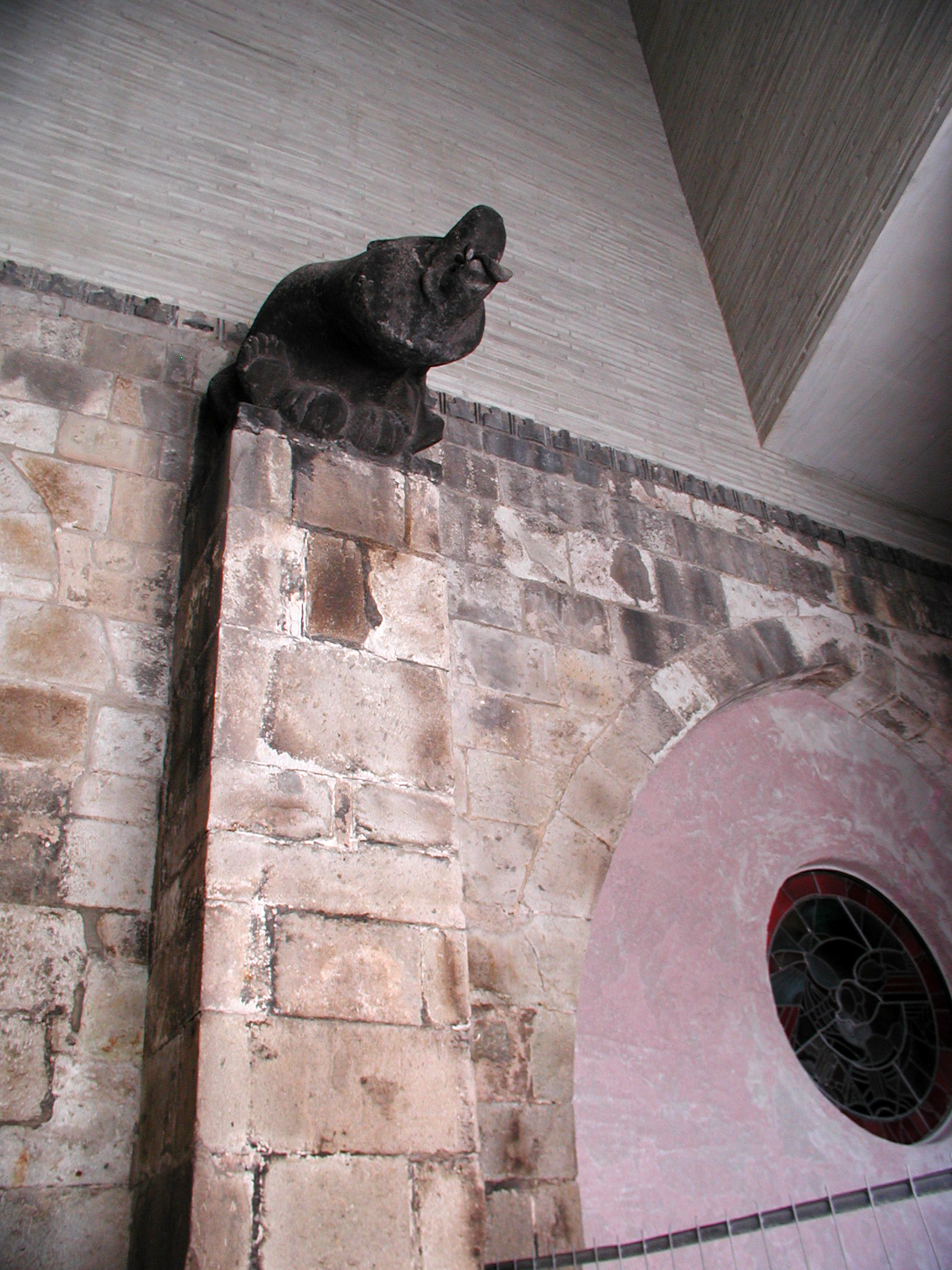 St. Kolumba, Köln